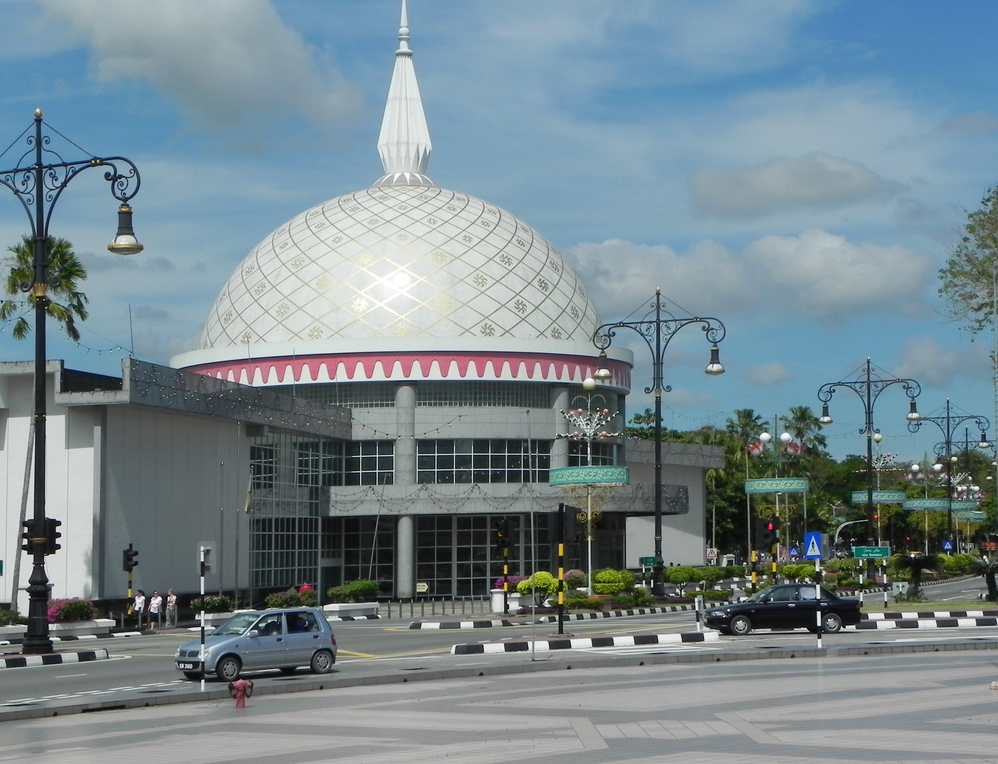 Royal Regalie, Museum der Präsente anlässlich der Inthronisierung des Sultans und der Parade des Krönungstages am 1. August 1968.